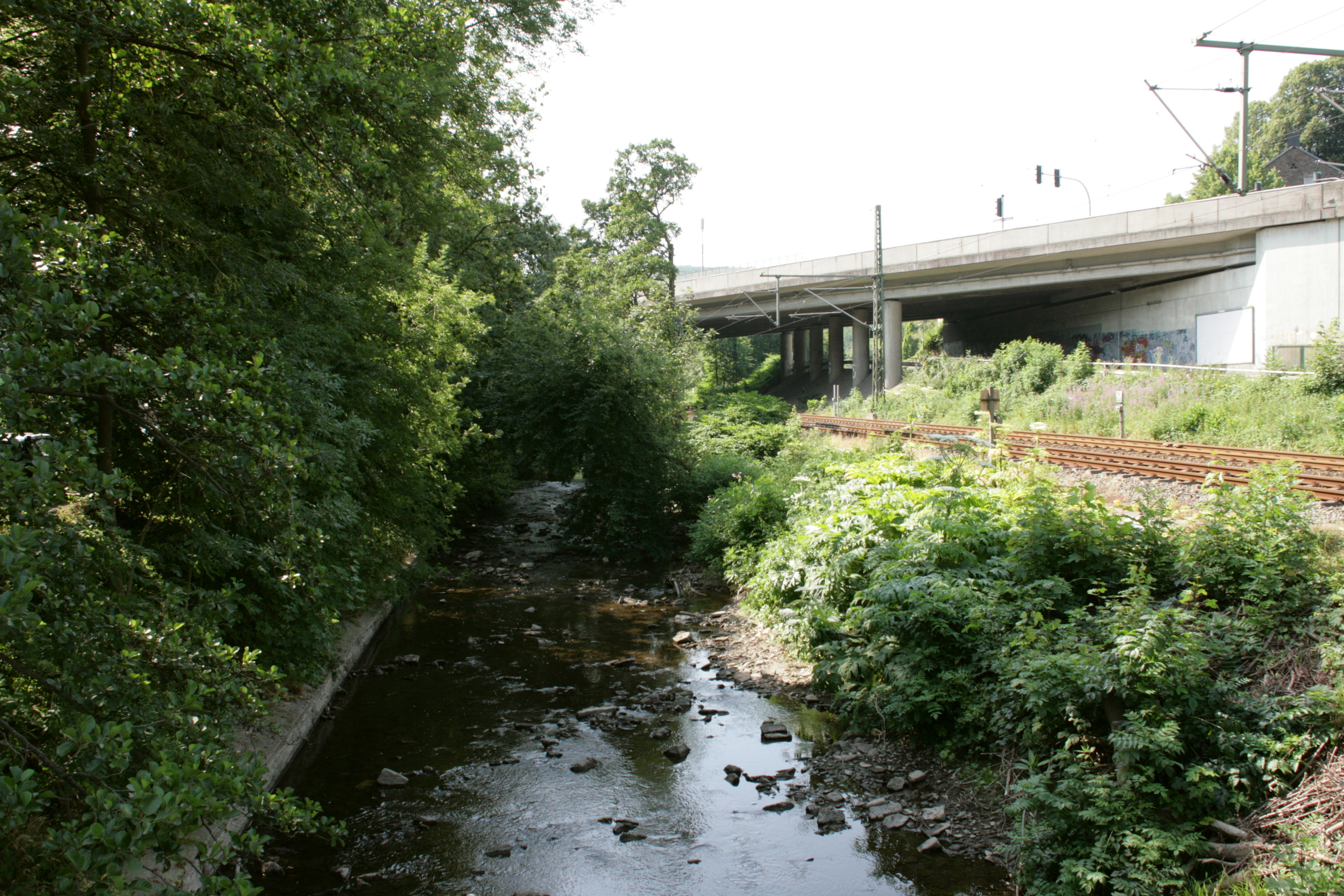 Straße Deilbachbrücke in Essen-Kupferdreh